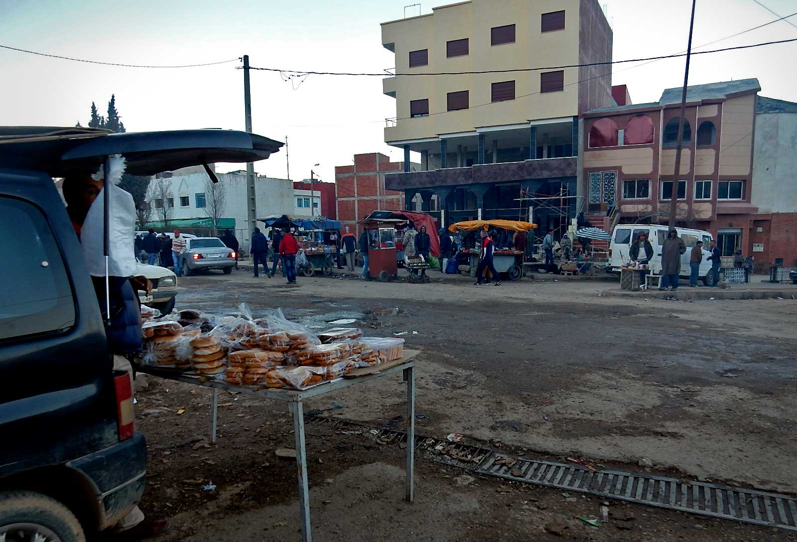 Der Hauptplatz von Issaguen (Ketama). The main square of Issaguen (Ketama).